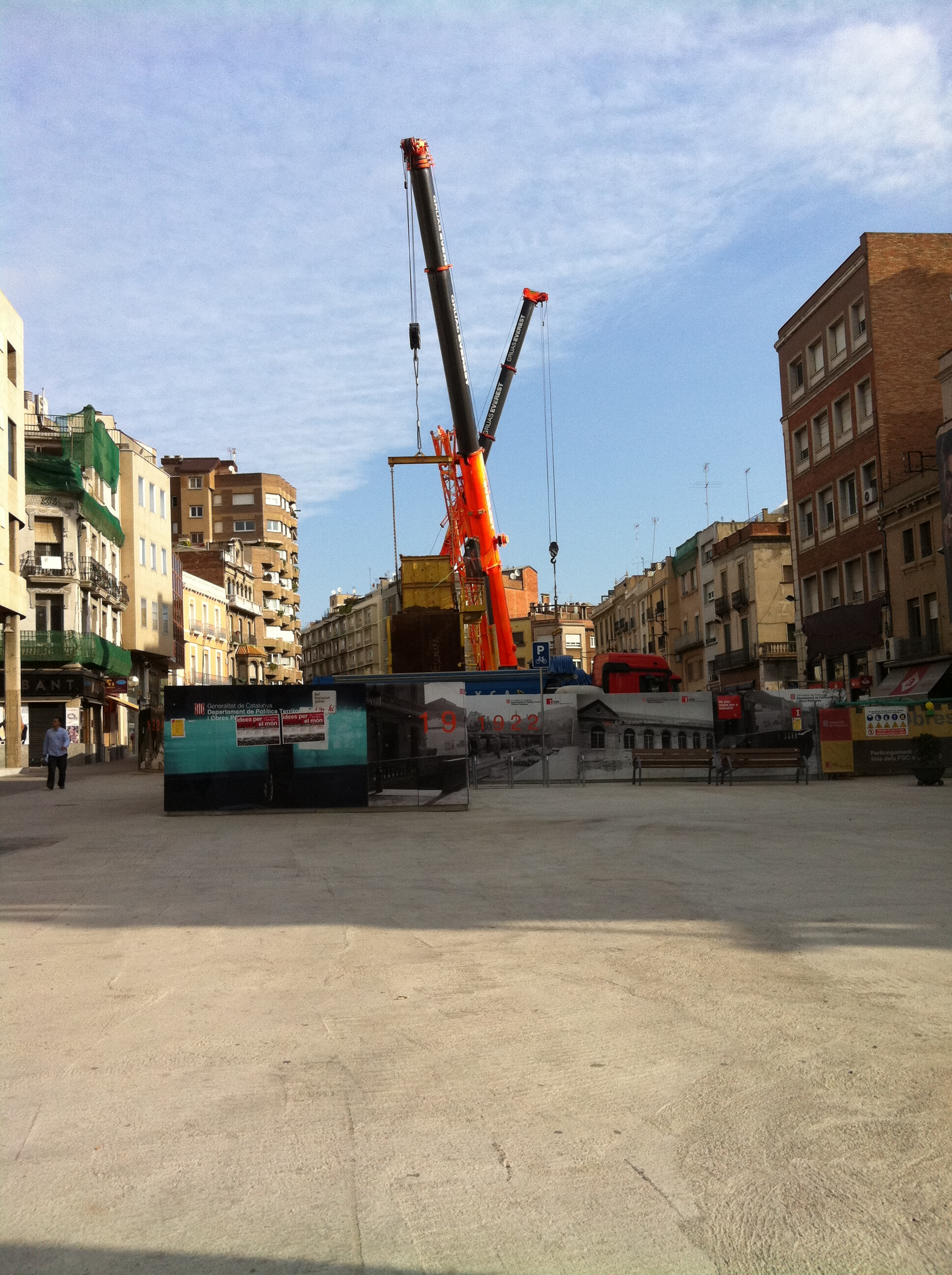 Obres d'ampliació de la línia S2 dels Ferrocarrils Catalans de la Generalitat, al seu pas per Sabadell